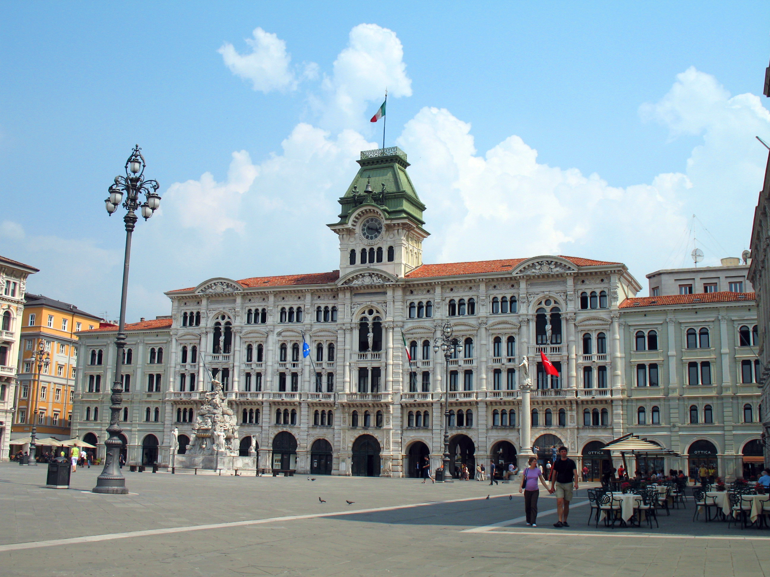 Immagine da Trieste, Friuli-Venezia Giulia, Italia.